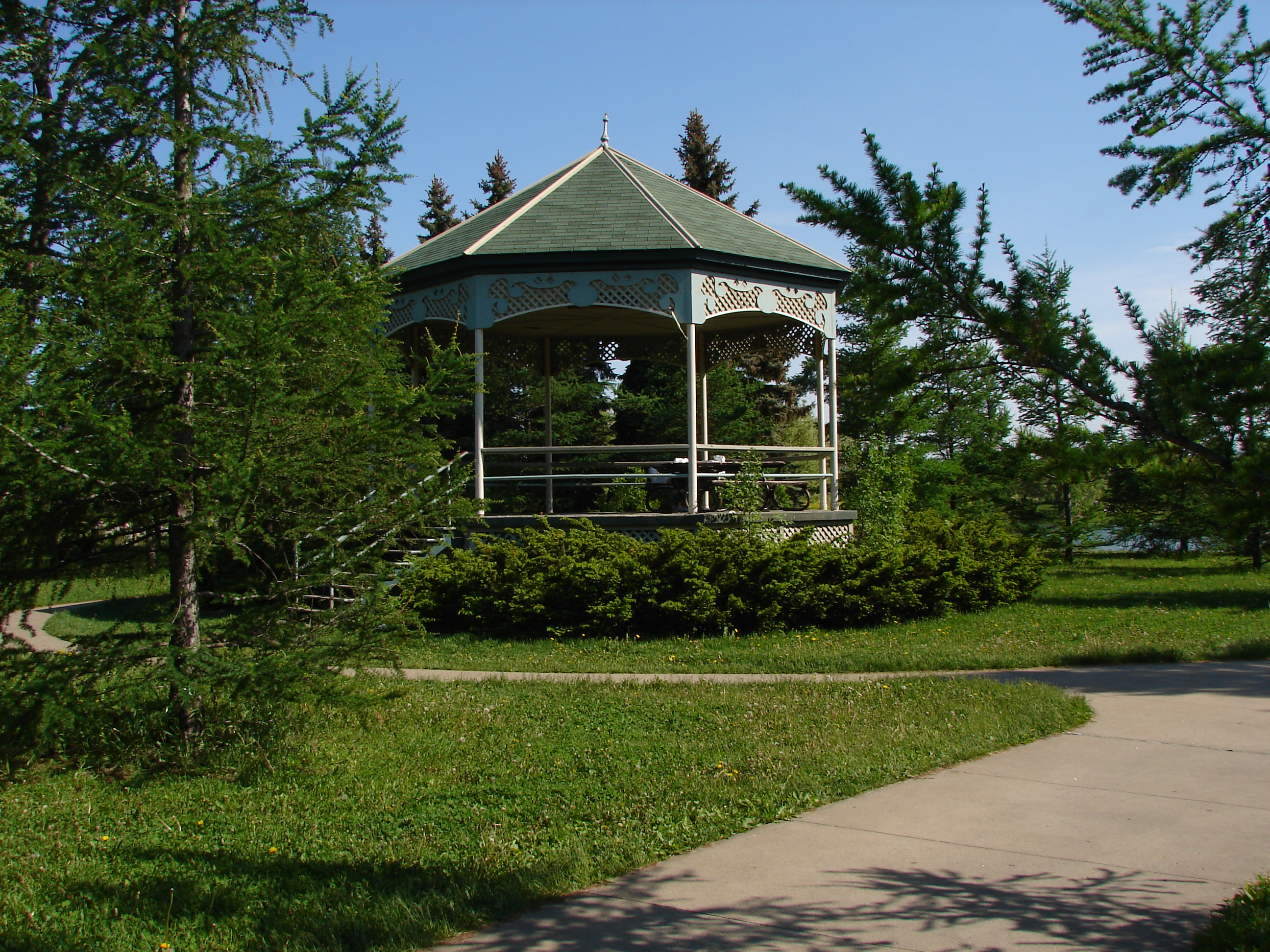 Author: Miguel Tremblay Date: May 29 2006 Source: Photo taken by me on a walk into the Jarry parc. Place: Music'kiosk in the Jarry parc in Montreal build in 1928, Québec, Canada. C'est bien un kiosque à musique qui date de 1928 selon la référence que font la Coalition des amis du parc Jarry. C'est ce qui doit apparaître dans la description de la photo. Gazébo est un anglicisme. En français on emploit gloriette selon l'Office de la langue française du Québec. Donc il faut changer la description de l'image.